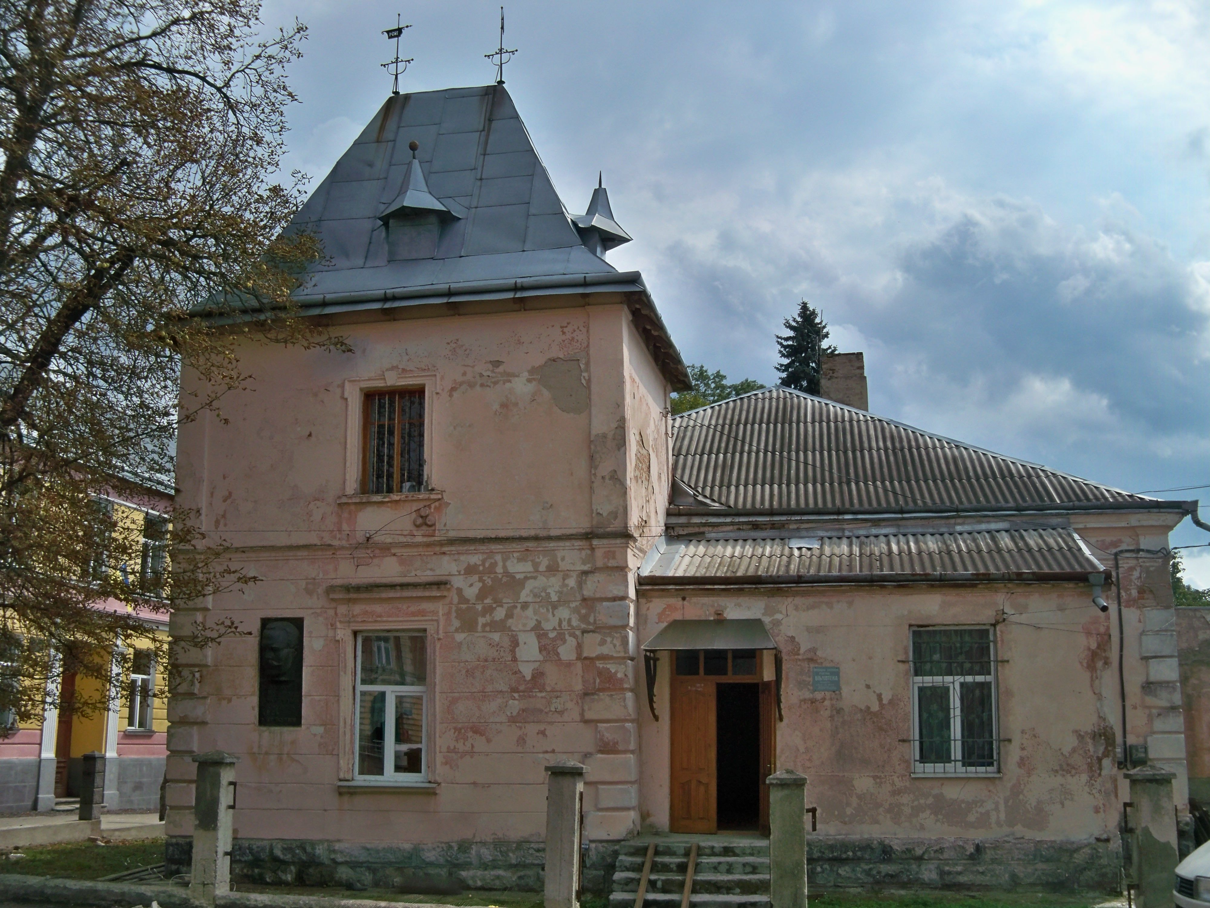 Будинок, в якому жив і працював Лесь Мартович, український письменник (худ.-мем. табл., ск. В. Липовий, 1971 р., бронза), Городок, вул. Мартовича, 3